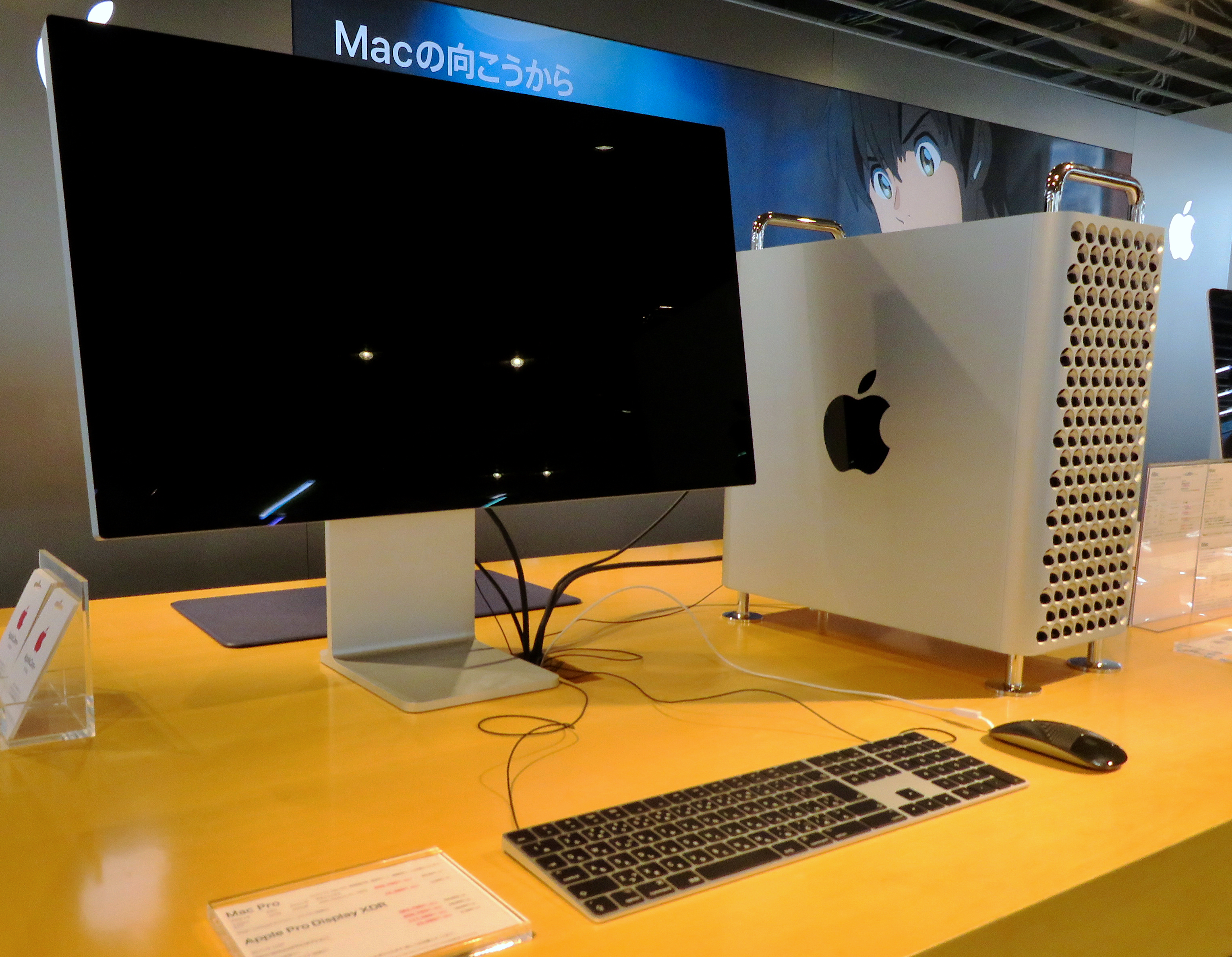 Apple Pro Display XDRとMac Pro（2019年モデル）。名古屋市のビックカメラ名古屋駅西店で撮影。